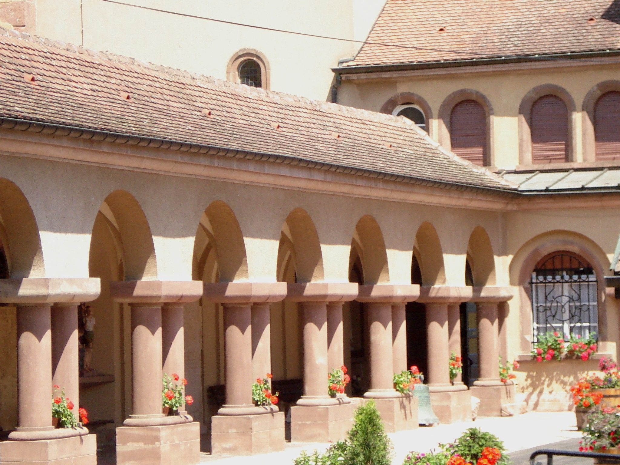 Thierenbach : Galerie des pélerins